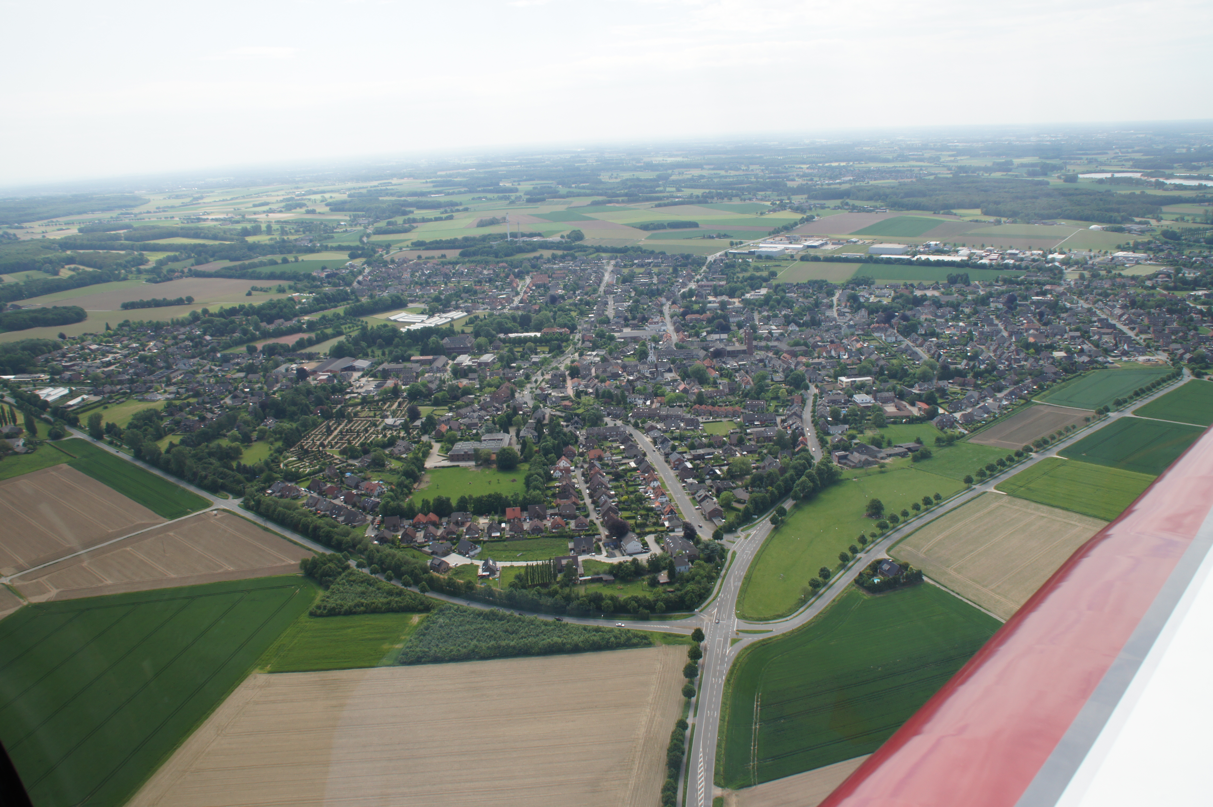 Uedem, Luftaufnahme, Ansicht von Norden